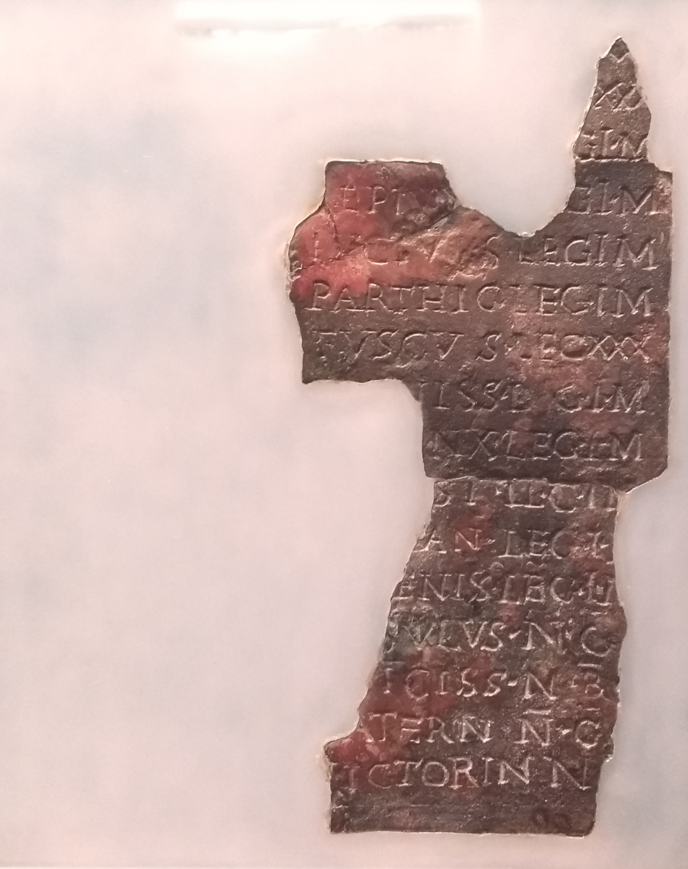 Zwei Bronzetäfelchen mit den Namen von Soldaten der 1. Legion (damals in Bonn stationiert), der 30. Legion (damals in Xanten) und zweier kleinerer Einheiten (Numeri). Fundort unbekannt, Rheinisches Landesmuseum Bonn: Tafel 1. Siehe Marcus Reuter: Legio XXX Ulpia Victrix. Ihre Geschichte, ihre Soldaten, ihre Denkmäler (= Xantener Berichte. Band 23). Philipp von Zabern, Darmstadt/Mainz 2012, S. 119–121.